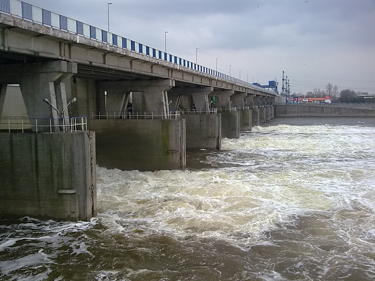 Barrier dam in Włocławek -Poland